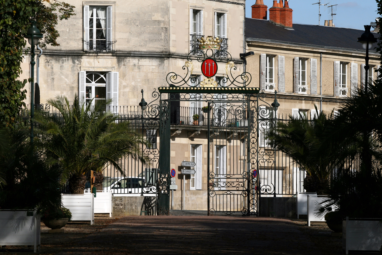 Jardin Blossac à Poitiers